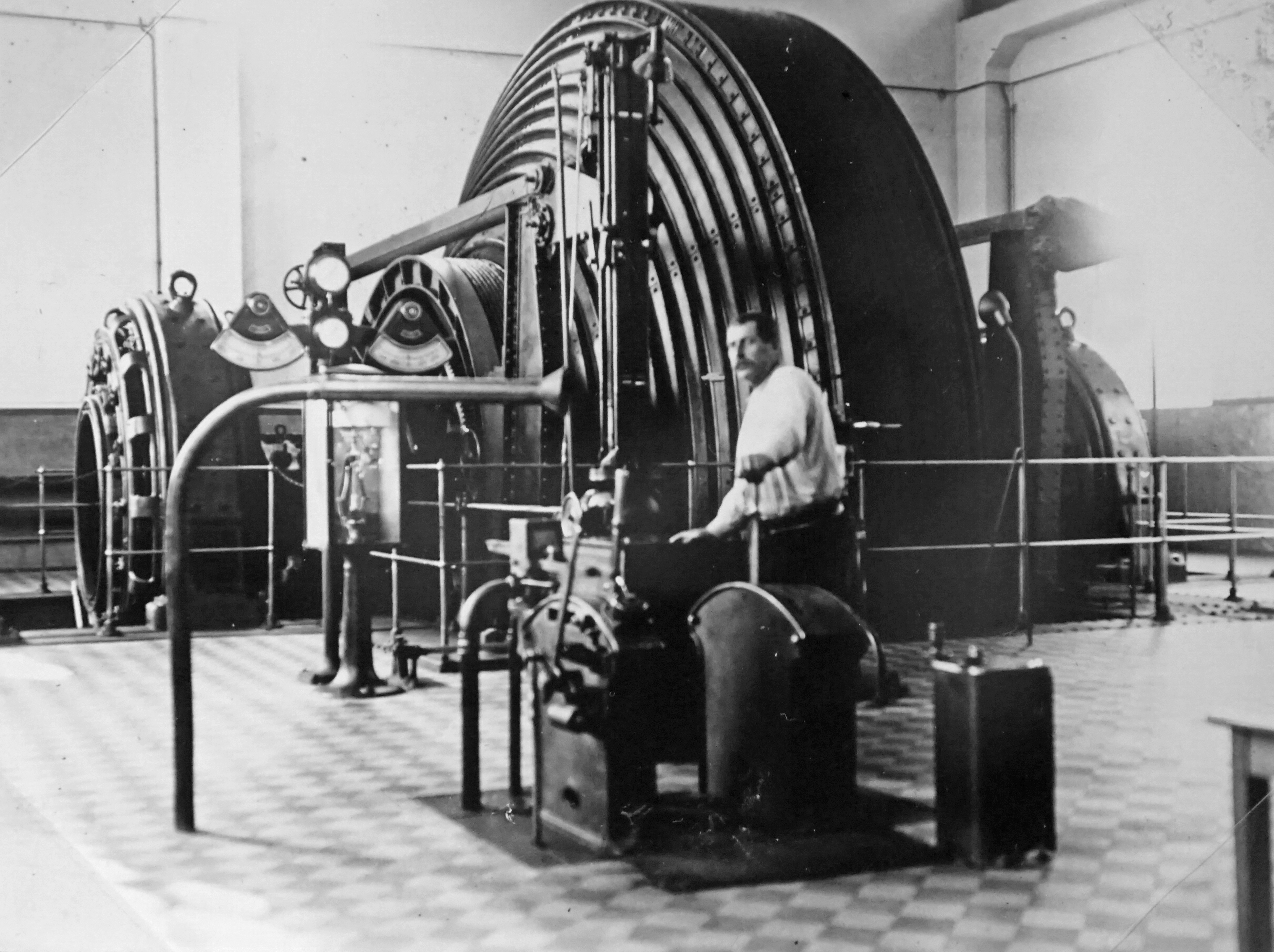 Machine électrique puits Arthur-de-Buyer.